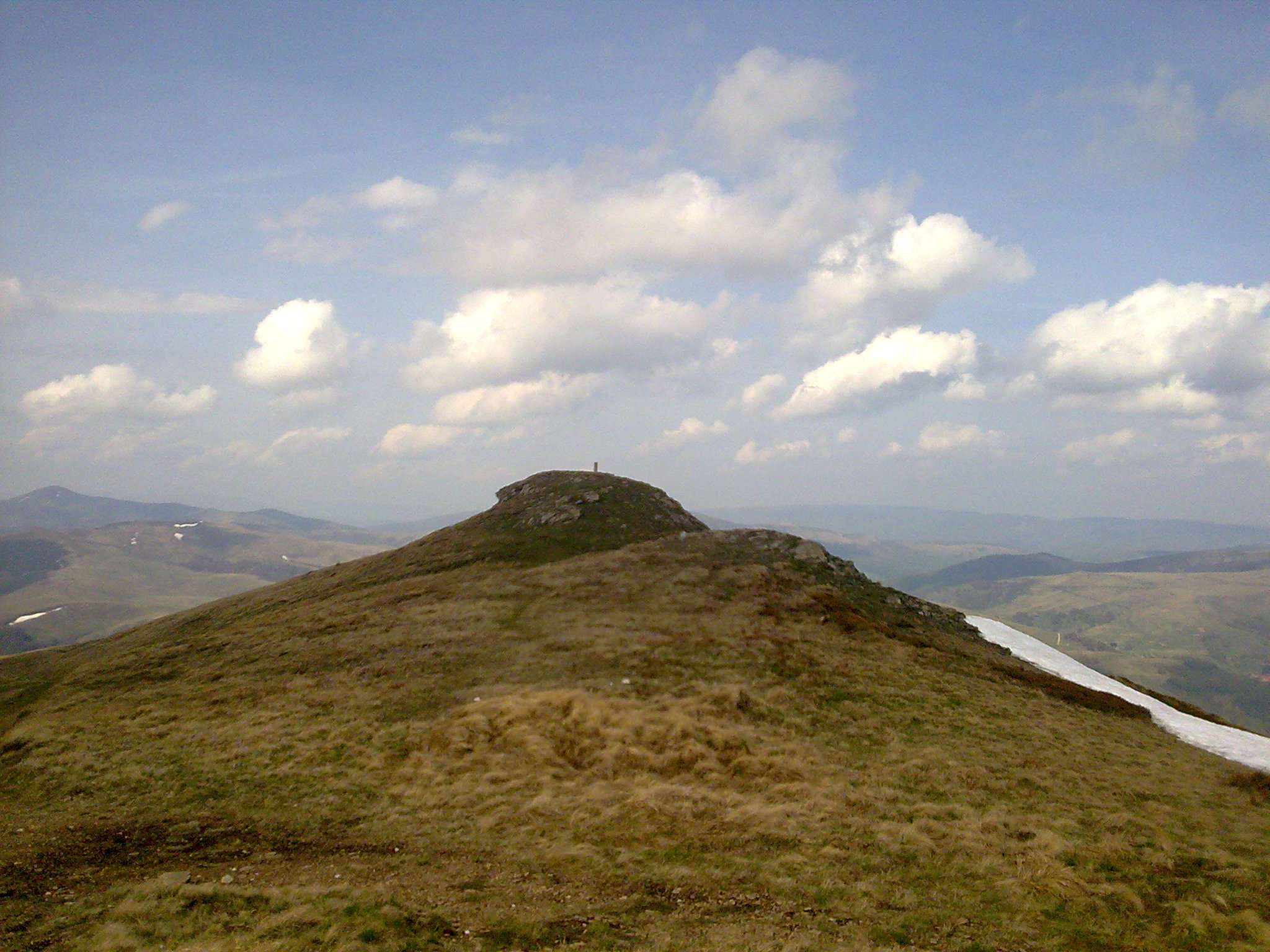 Besna Kobila